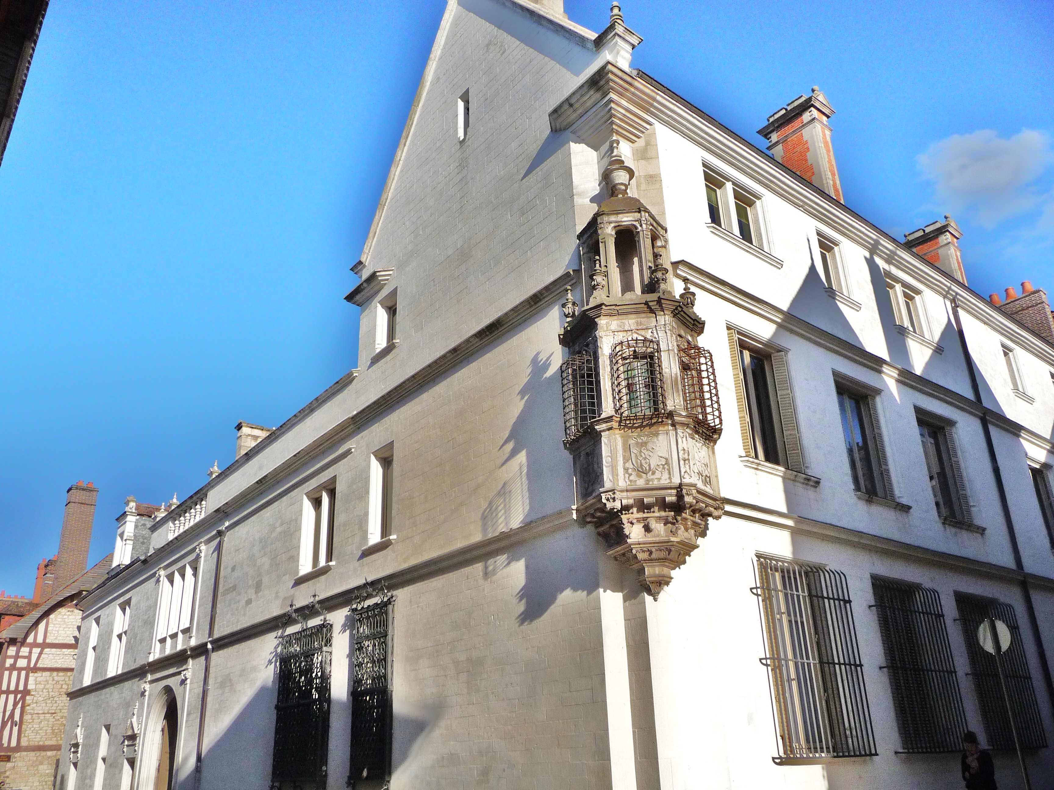 Maison de style Renaissance, comportant une cour intérieure. Les fenêtres de gauche sont ornées des grilles d'origine en fer simplement tordu. .